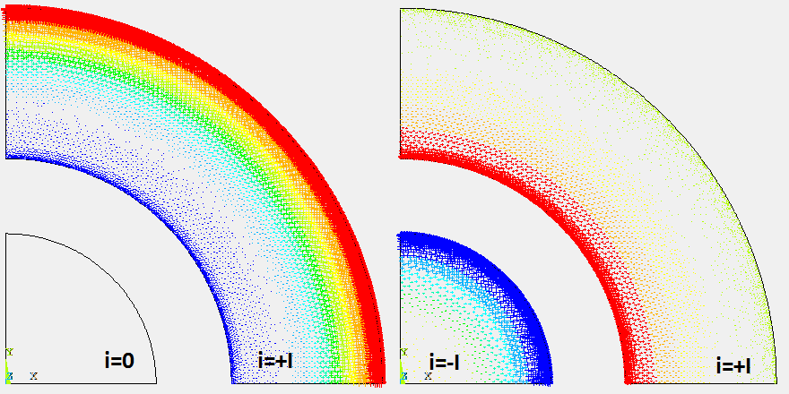 Zjawisko naskórkowości w przewodach koncentrycznychUnknown